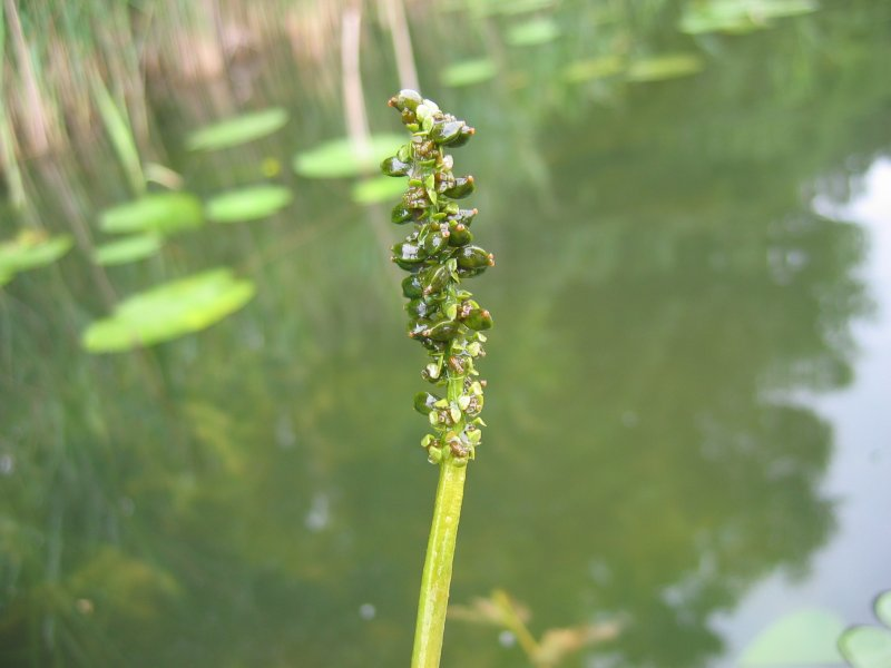 Langblättriges Laichkraut Potamogeton praelongus, Müritz-Gebiet